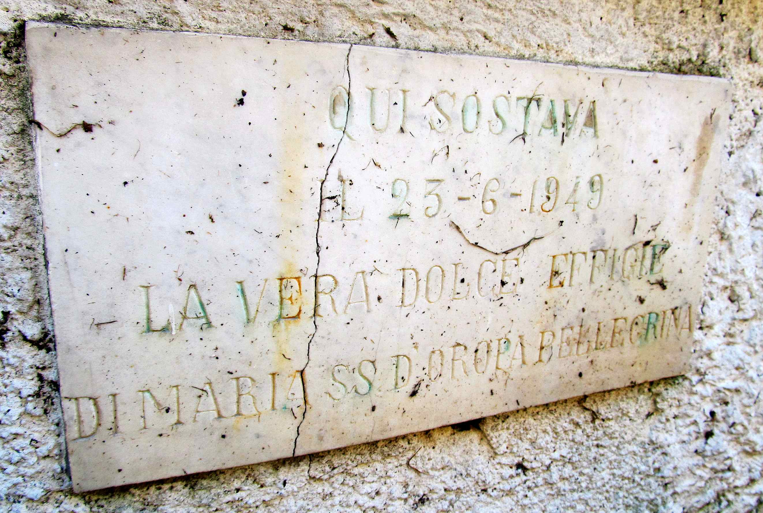 Dettaglio del pilone votivo in memoria della Peregrinatio Mariae (1949) in località Mojen (tra la Colma di Biella e Vaglio Pettinengo, BI)